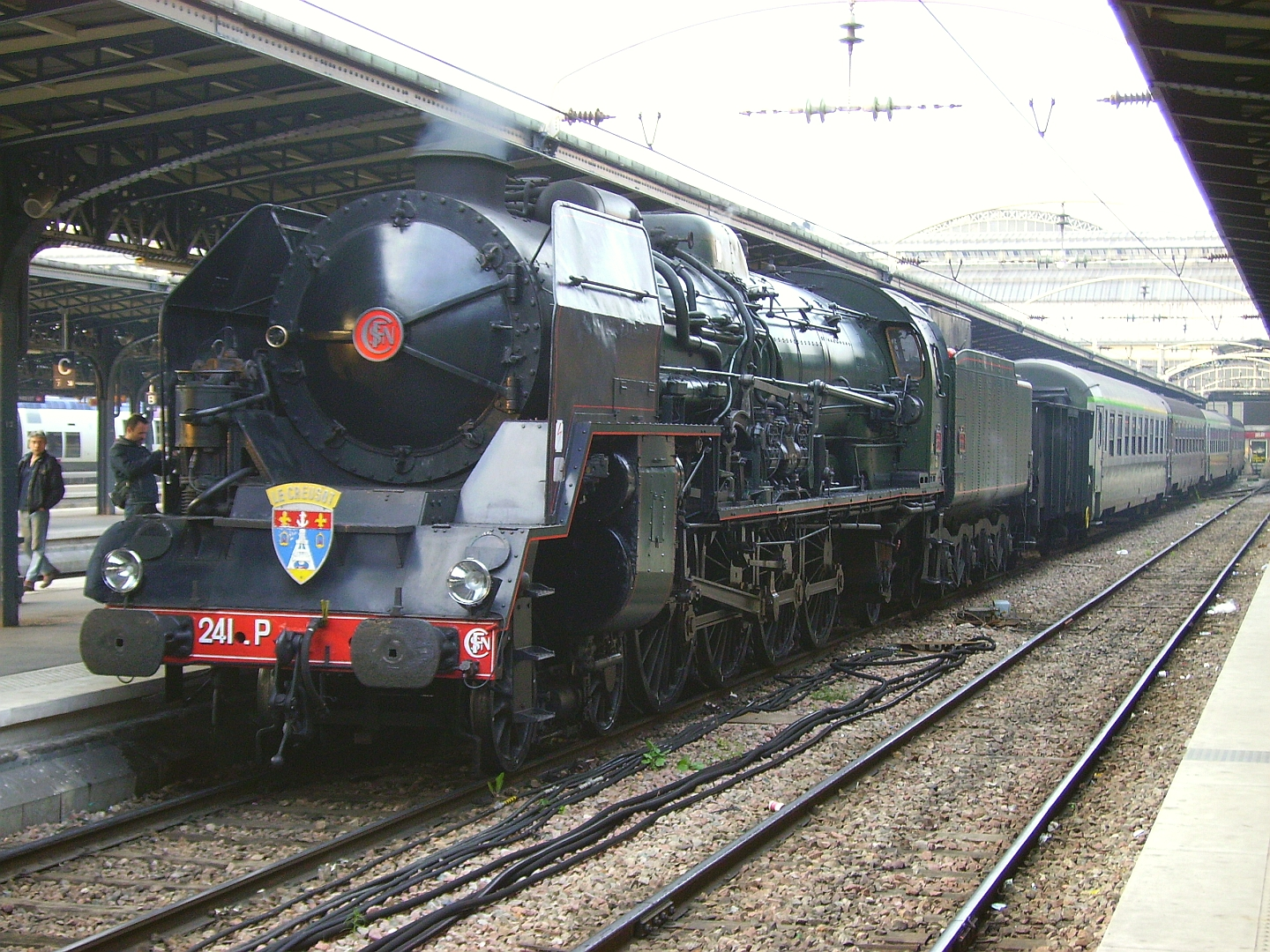 La 241 P 17 à Paris gare de l'Est le 8 mai 2010.